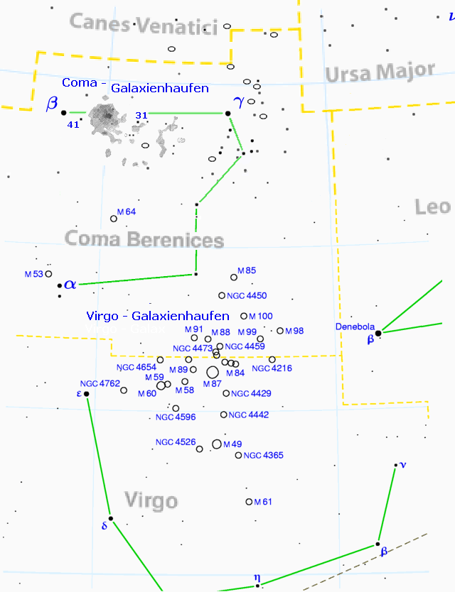 Sternbilder Coma Berenices und Virgo mit zwei Galaxiehaufen